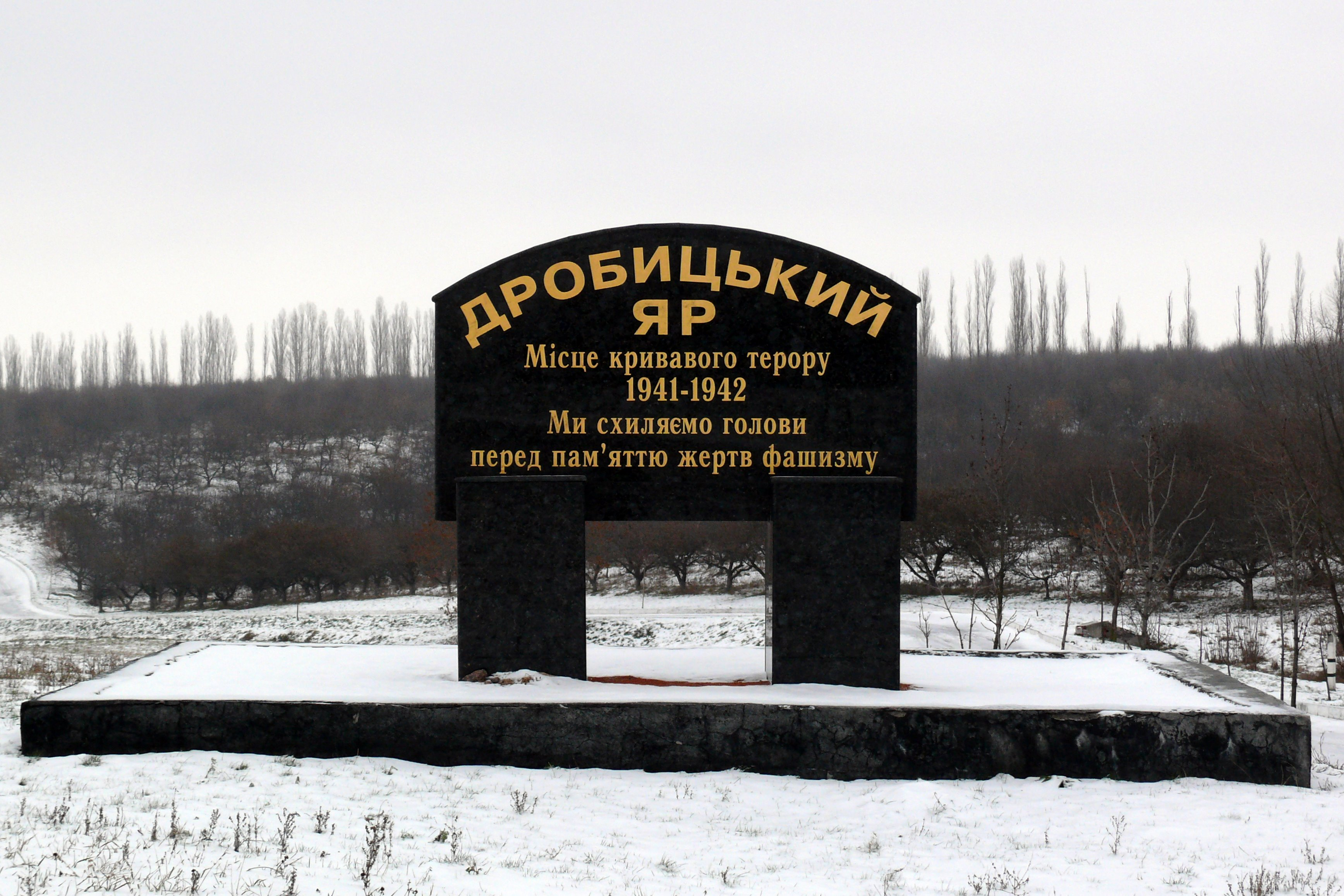 Drobitskiy znak